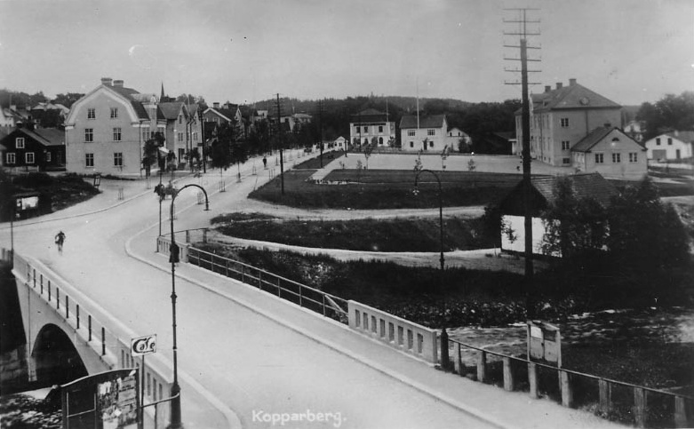 Centrala Kopparberg, 1920-tal. Foto efter gammalt vykort